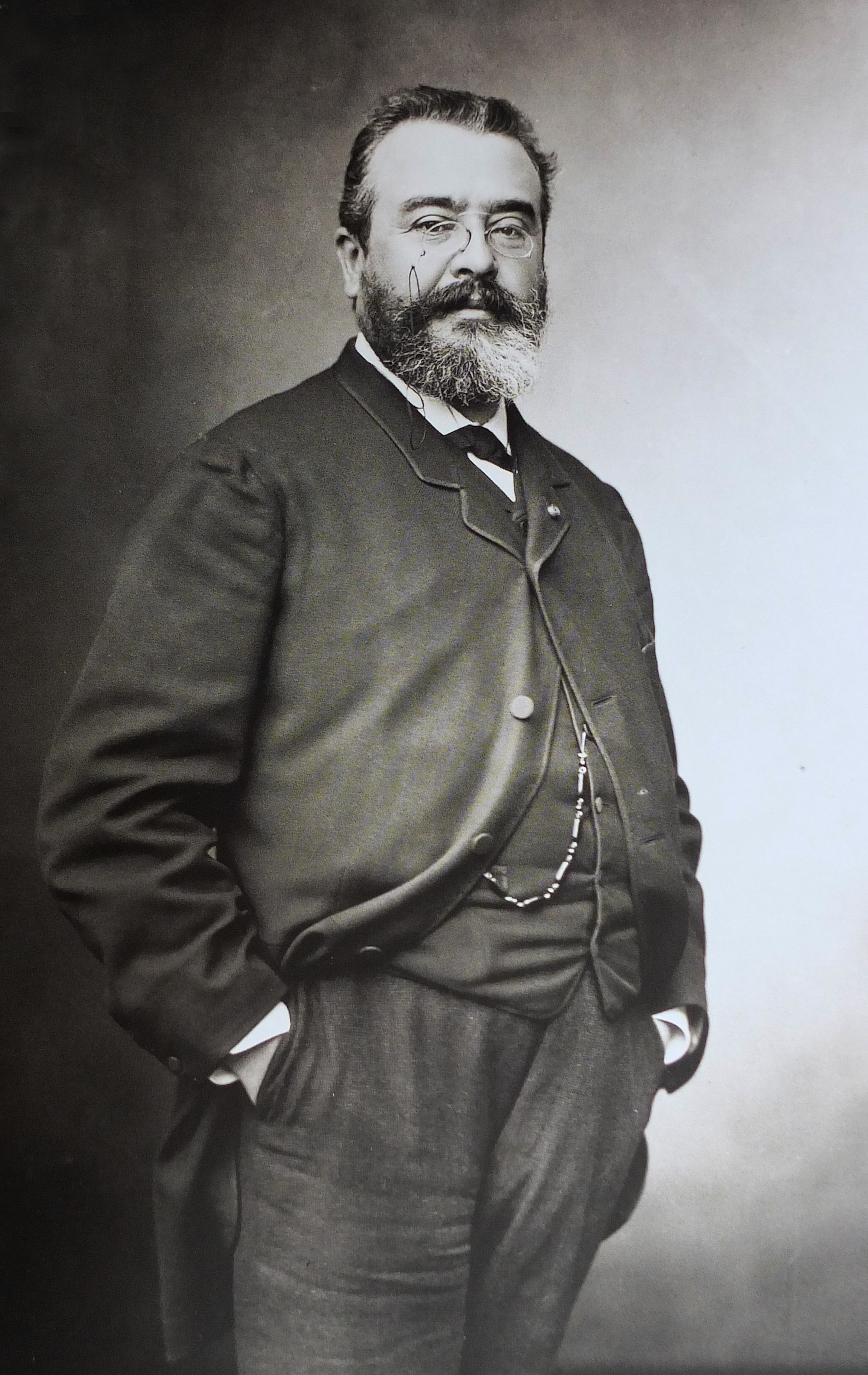 Adrien Proust (1834-1903), père de Marcel, photographié le 26 novembre 1886 par Paul Nadar.